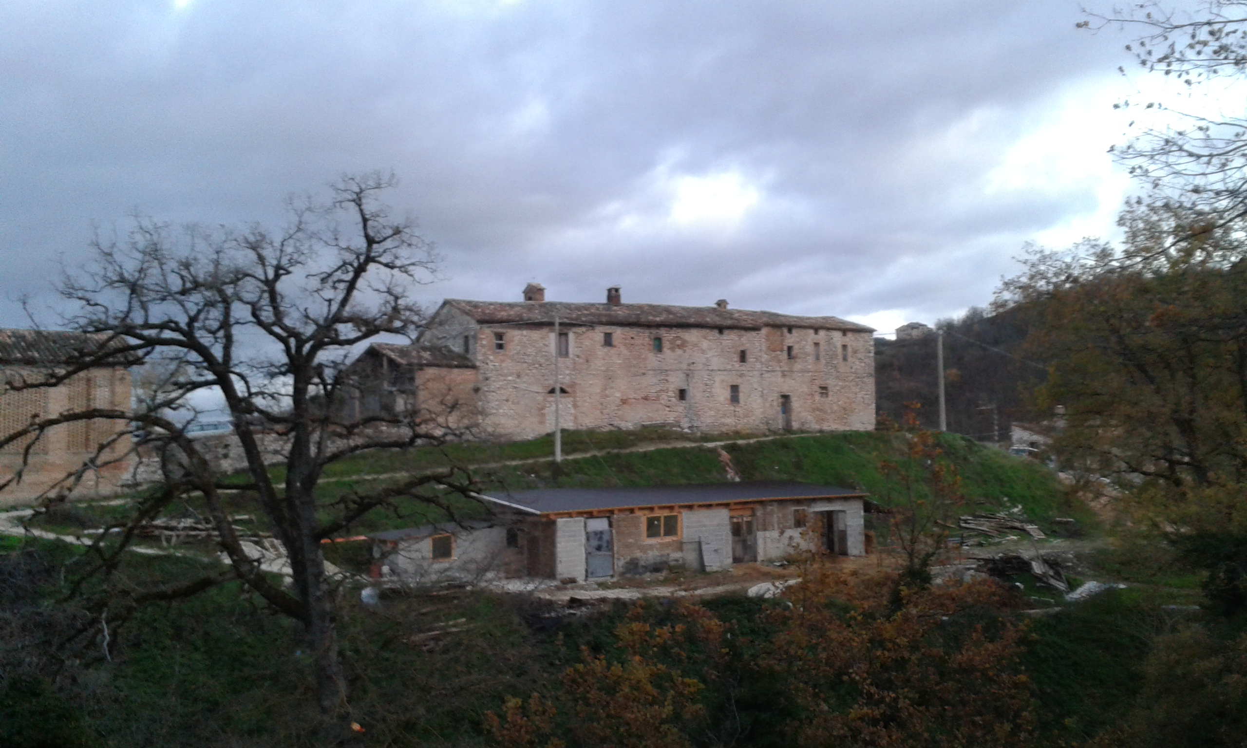 Romitorio di S.Romualdo in loc. Colle della Roscia, Vetice, Montefortino